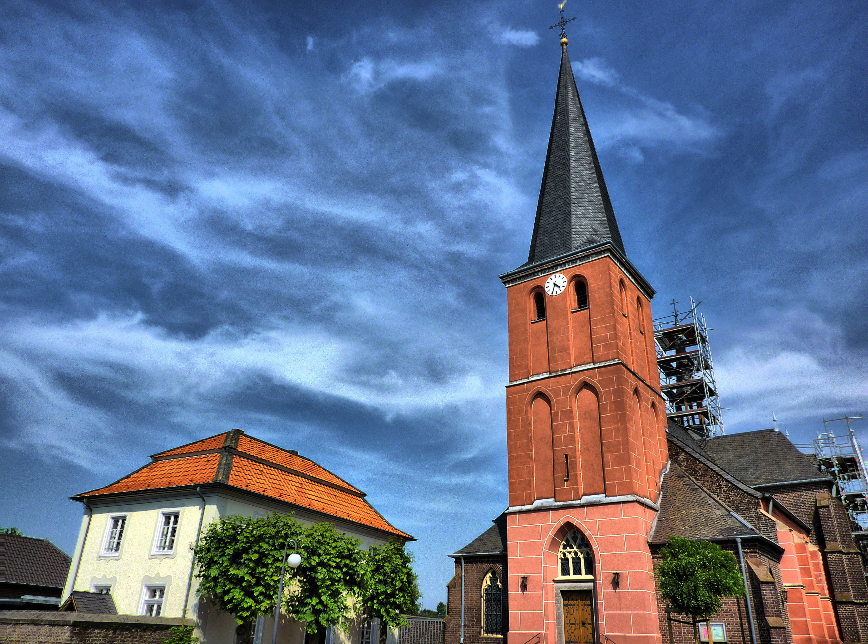 St. Gertrud, Dilkrath, Schwalmtal, Boisheimer Straße This image shows a heritage building in Germany, located in the North Rhine-Westphalian city Schwalmtal (Niederrhein) (no. 11).